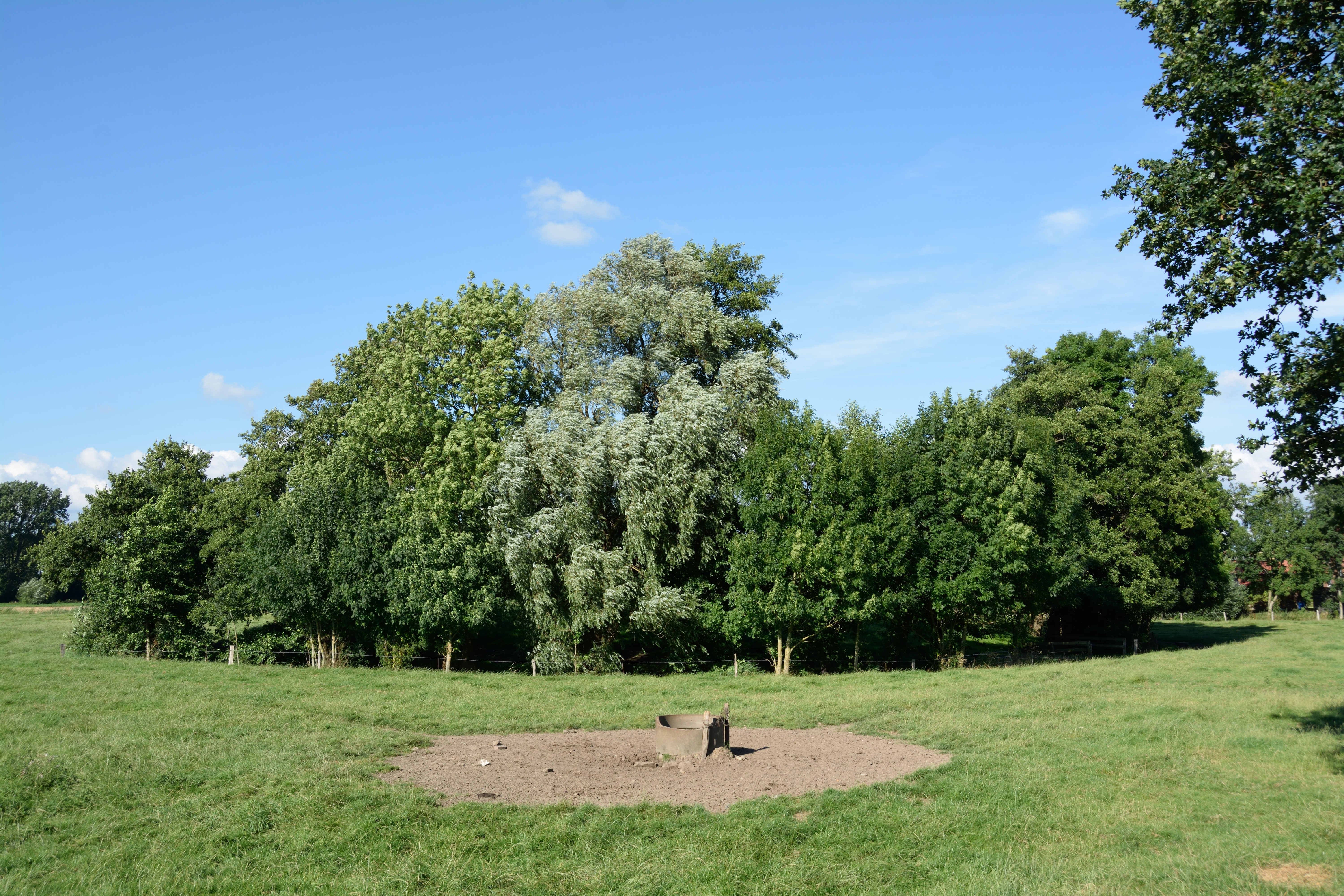 Standort der ehemaligen Steinburg im gleichnamigen Ortsteil der Gemeinde Süderau